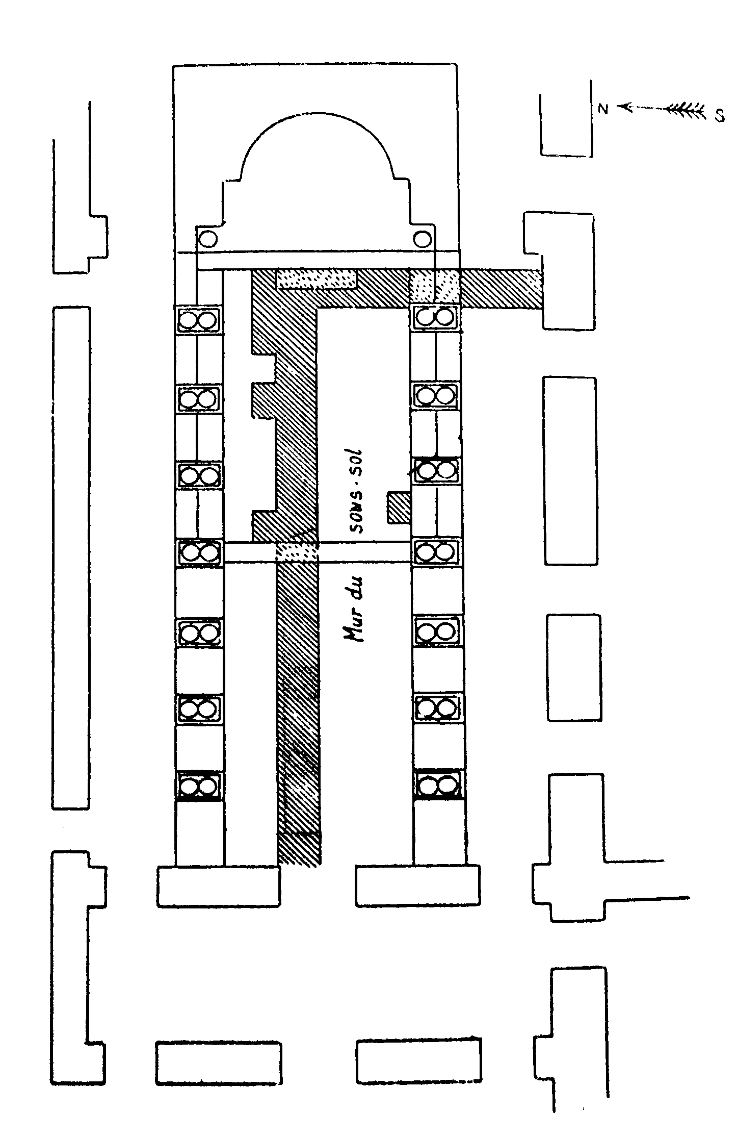 Mur enterré sous les fondations de la basilique de Dar el Kous au Kef en Tunisie